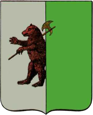 Герб города Петровск (1778)